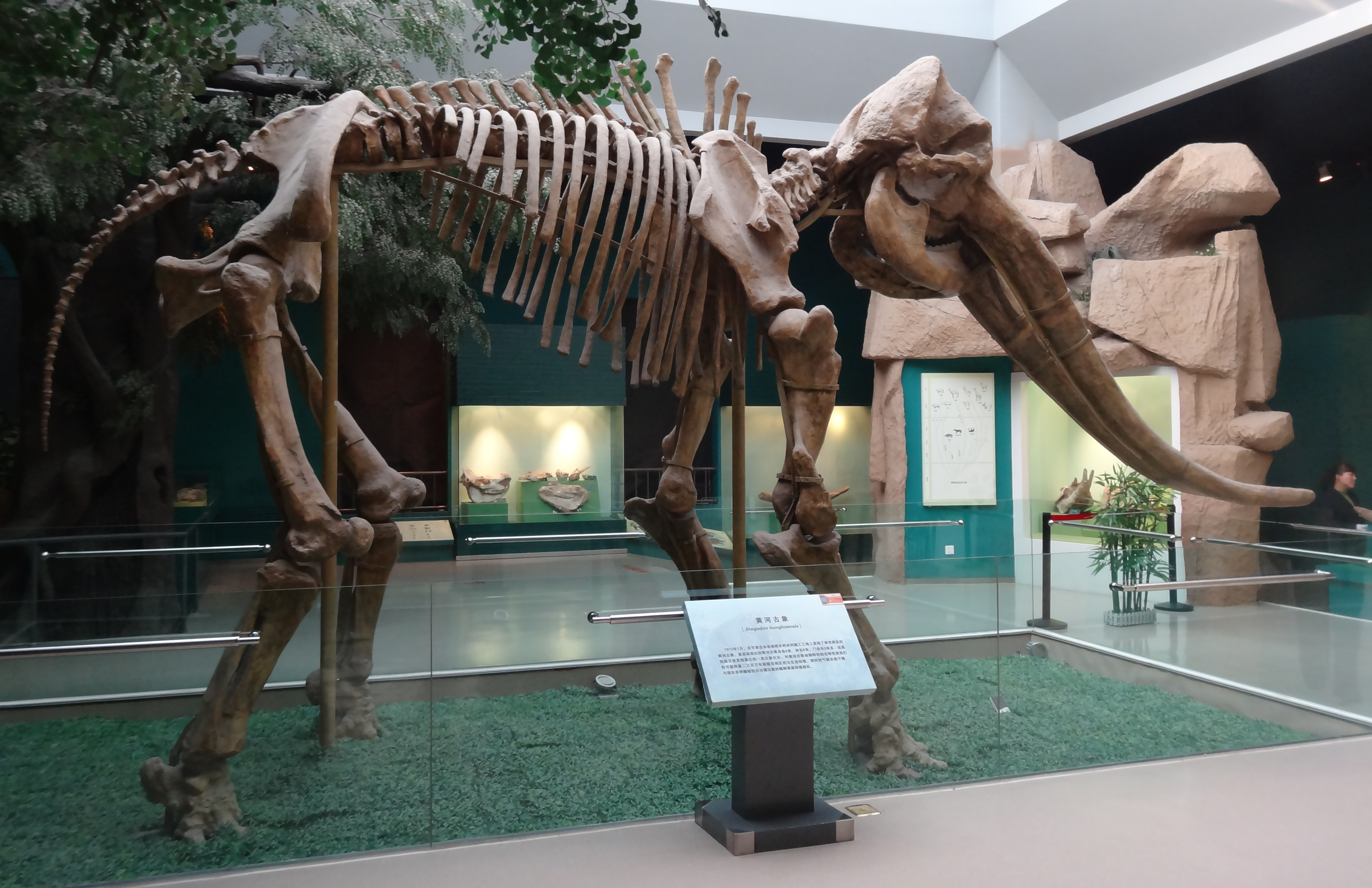 黄河剑齿象化石骨架，发掘于甘肃合水县板桥乡，现藏于甘肃省博物馆。